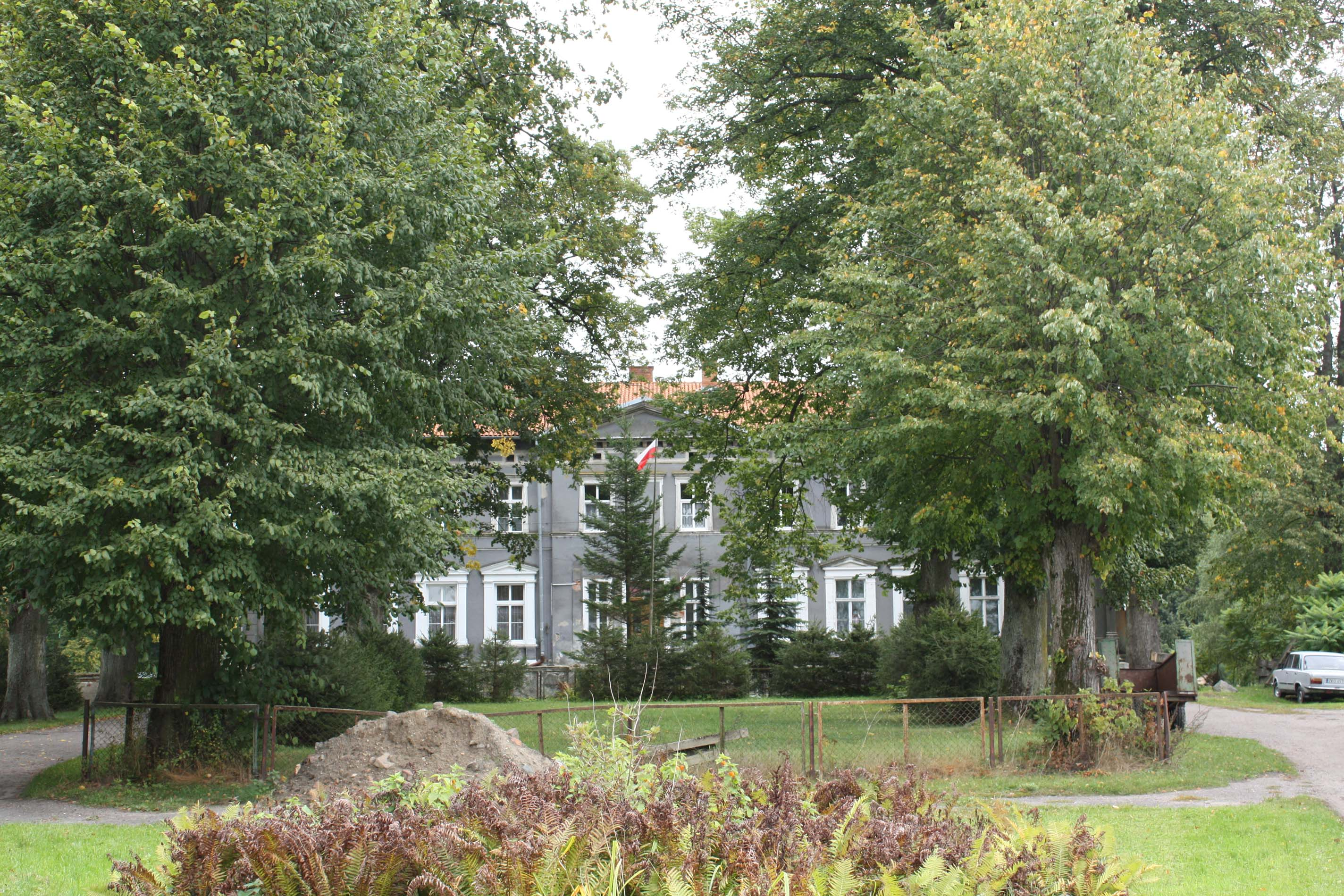 Pałac (park dworski) w Kraśniku Koszalińskim